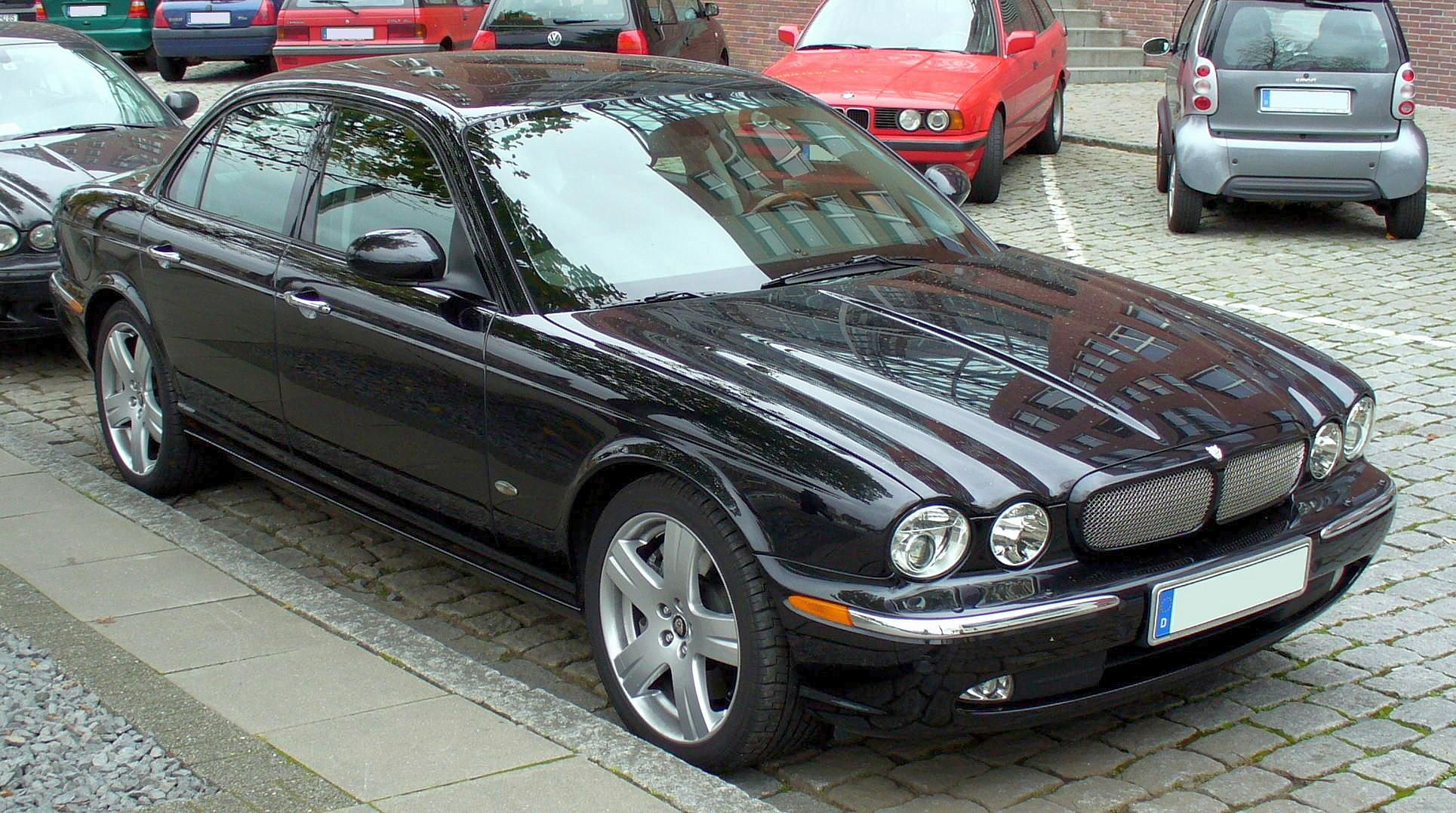 Jaguar XJR